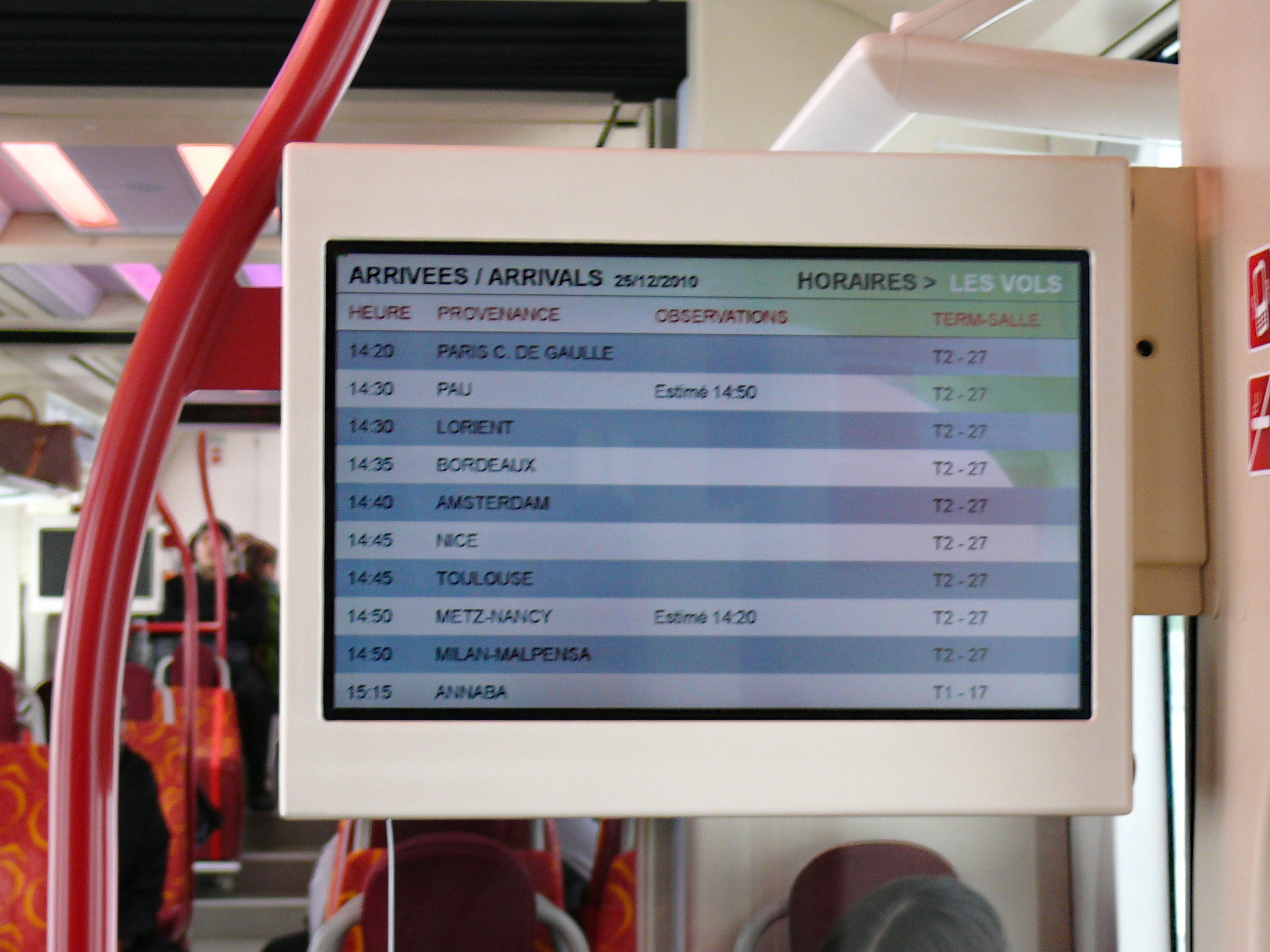 Rhônexpress : Service à bord des rames : des écrans informent les voyageurs, notamment sur les horaires d'arrivée et de départ des avions à l'aéroport de Lyon-Saint-Exupéry